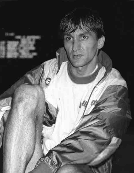 Sorin Matei in Bucharest